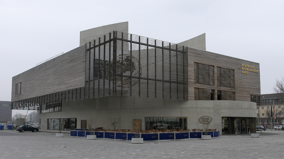 Museum Bremerhaven: German Emigration Center Native nameDeutsches AuswandererhausLocationColumbusstraße 6527568 Bremerhaven, Bremen GermanyCoordinates53° 32′ 43.08″ N, 8° 34′ 27.01″ E Established8 August 2005Web pageDeutsches AuswandererhausAuthority control : Q318809 VIAF: 131244556 LCCN: nr2005008075 GND: 16035841-3 SUDOC: 118763741 WorldCat institution QS:P195,Q318809